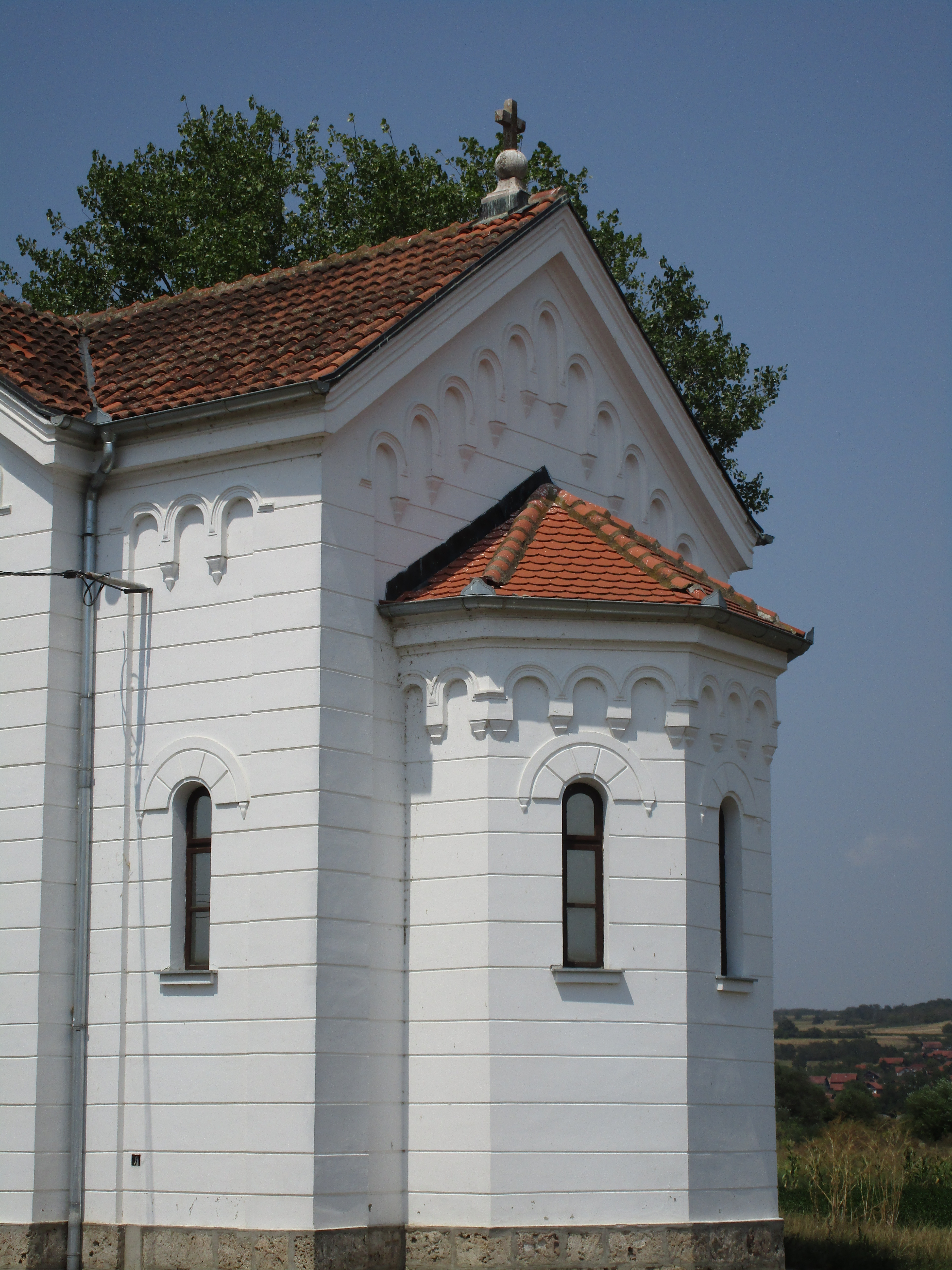 Srpski (latinica): Crkva Uspenja Presvete Bogorodice, Žitorađa